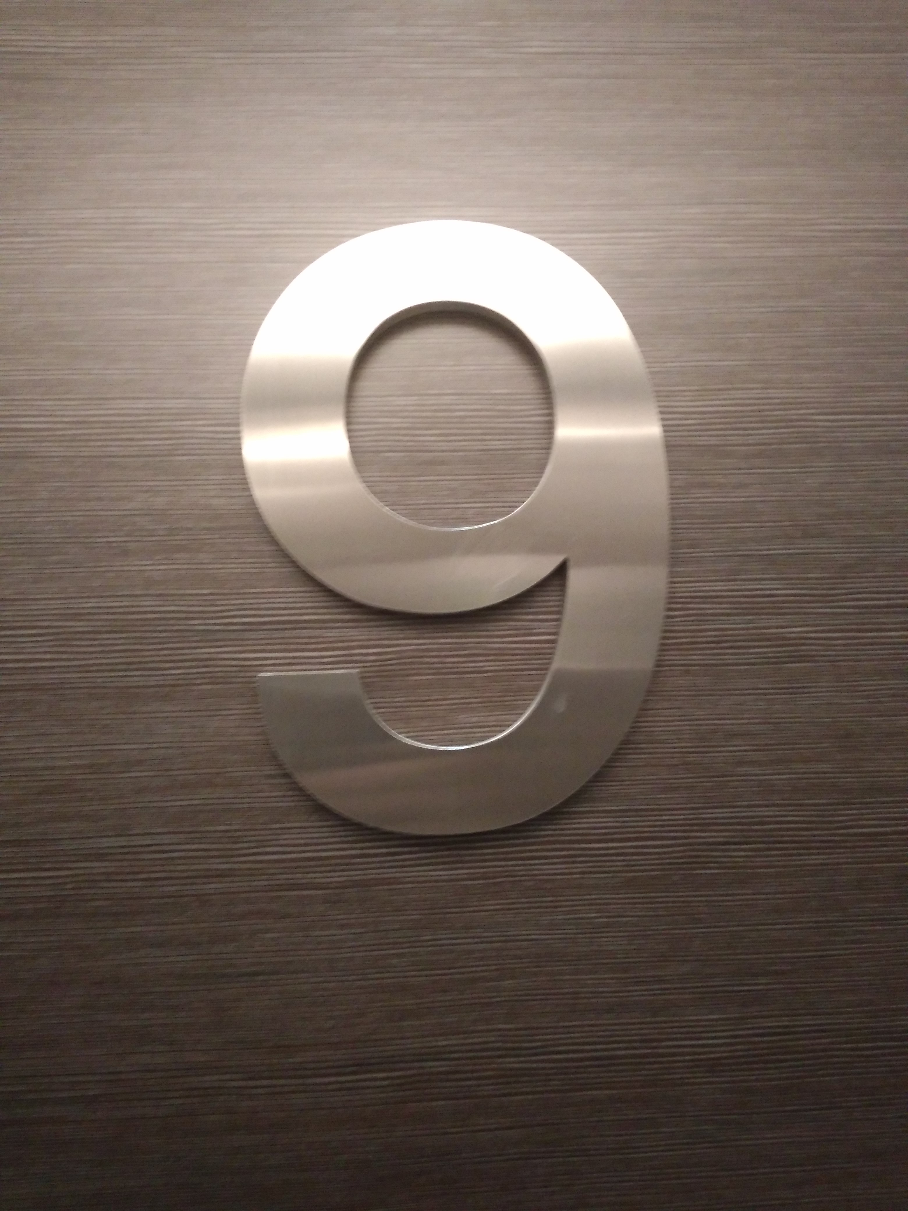 Nine